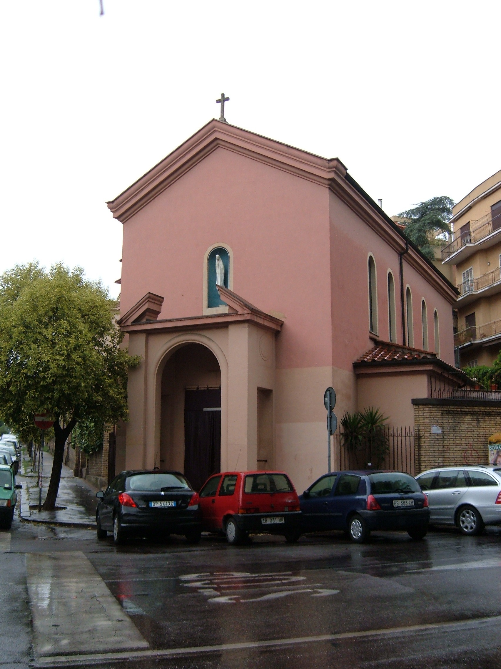 Chiesa di Santa Giuliana Falconieri, a Roma, nel quartiere Gianicolense.